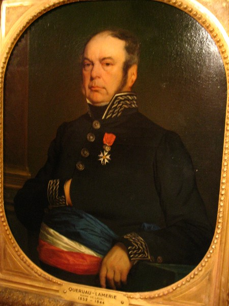 Pierre Queruau-Lamerie, maire de Laval